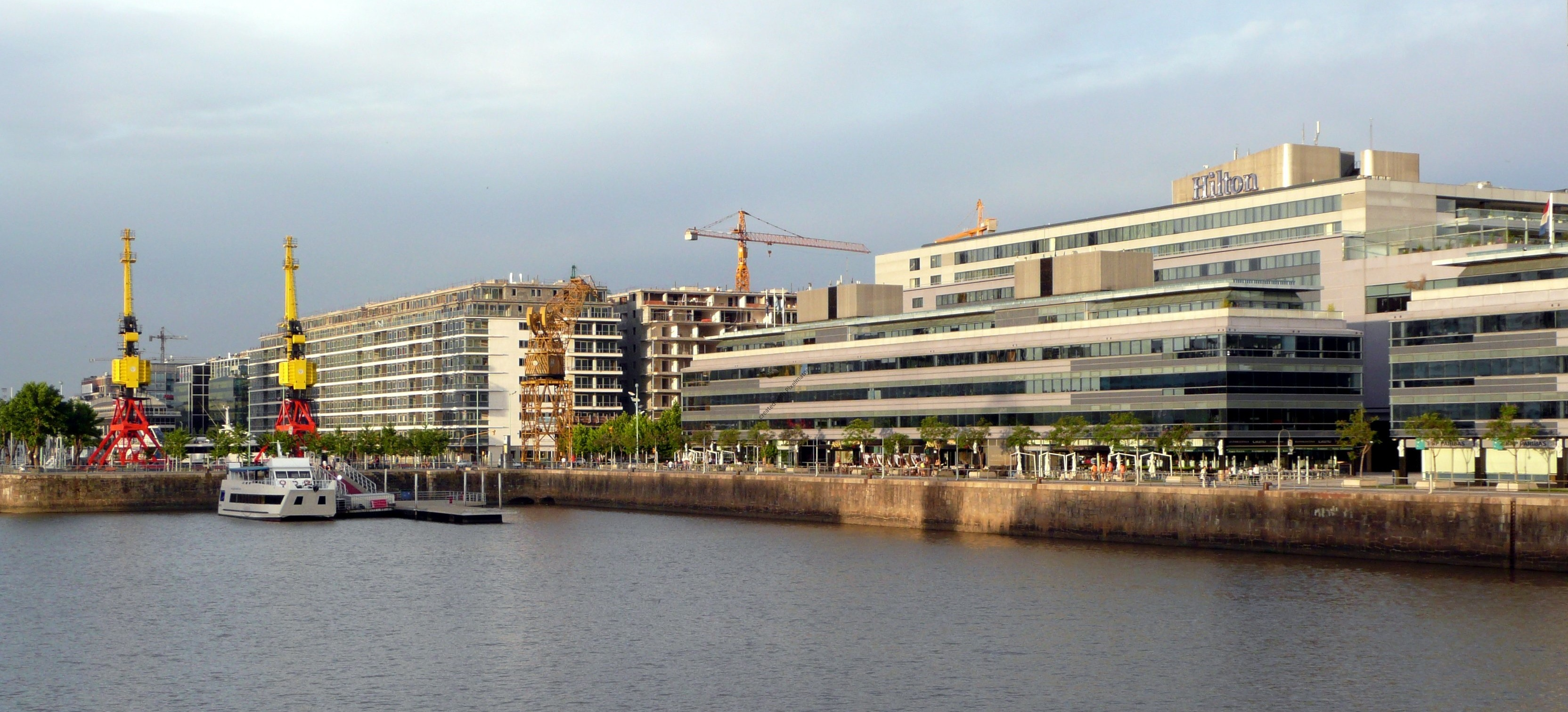 Hotel Hilton, en Puerto madero, Buenos Aires, Argentina.